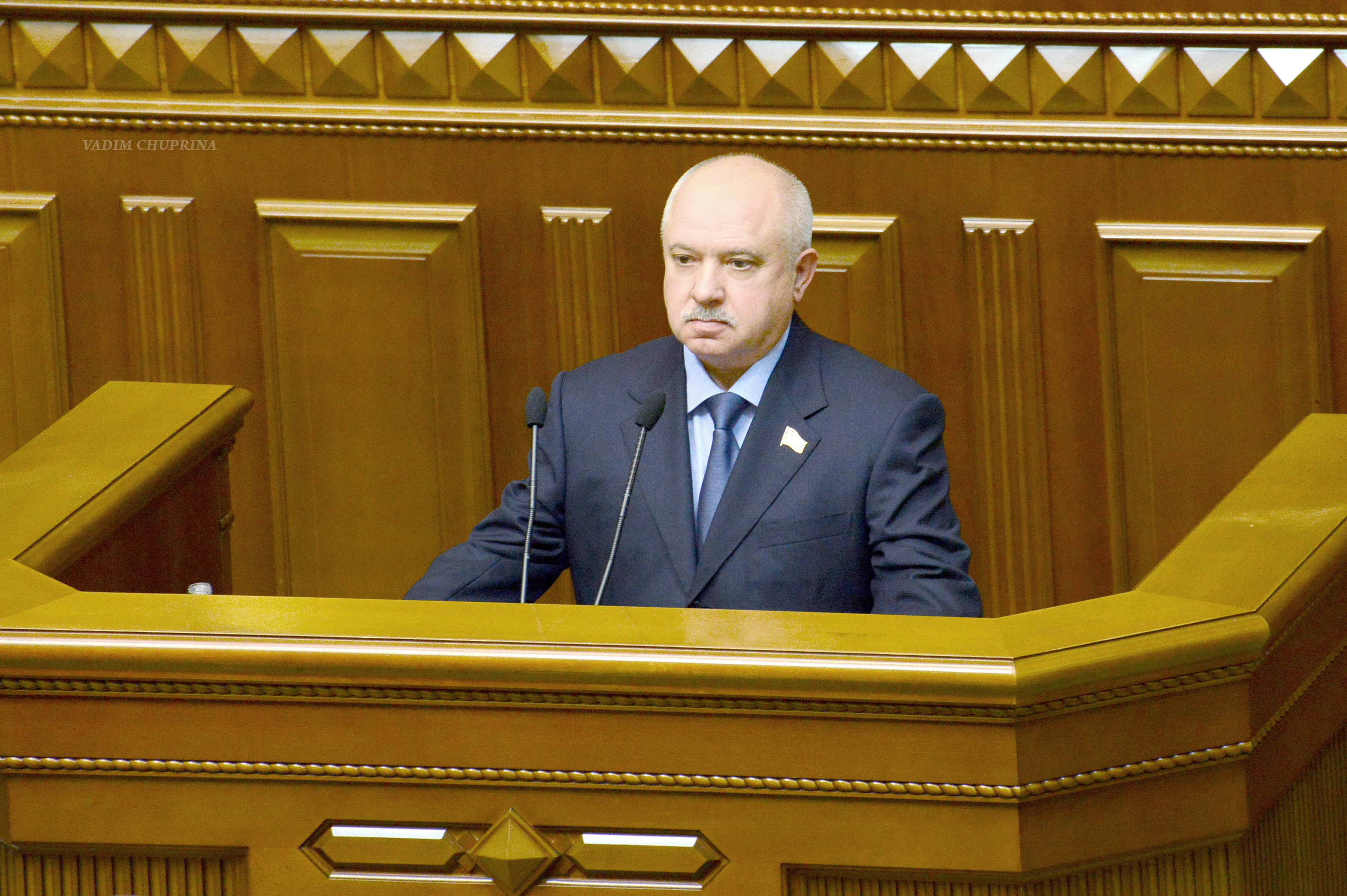 ВЕРХОВНАЯ РАДА УКРАИНЫ 2013 , фото Вадим Чуприна